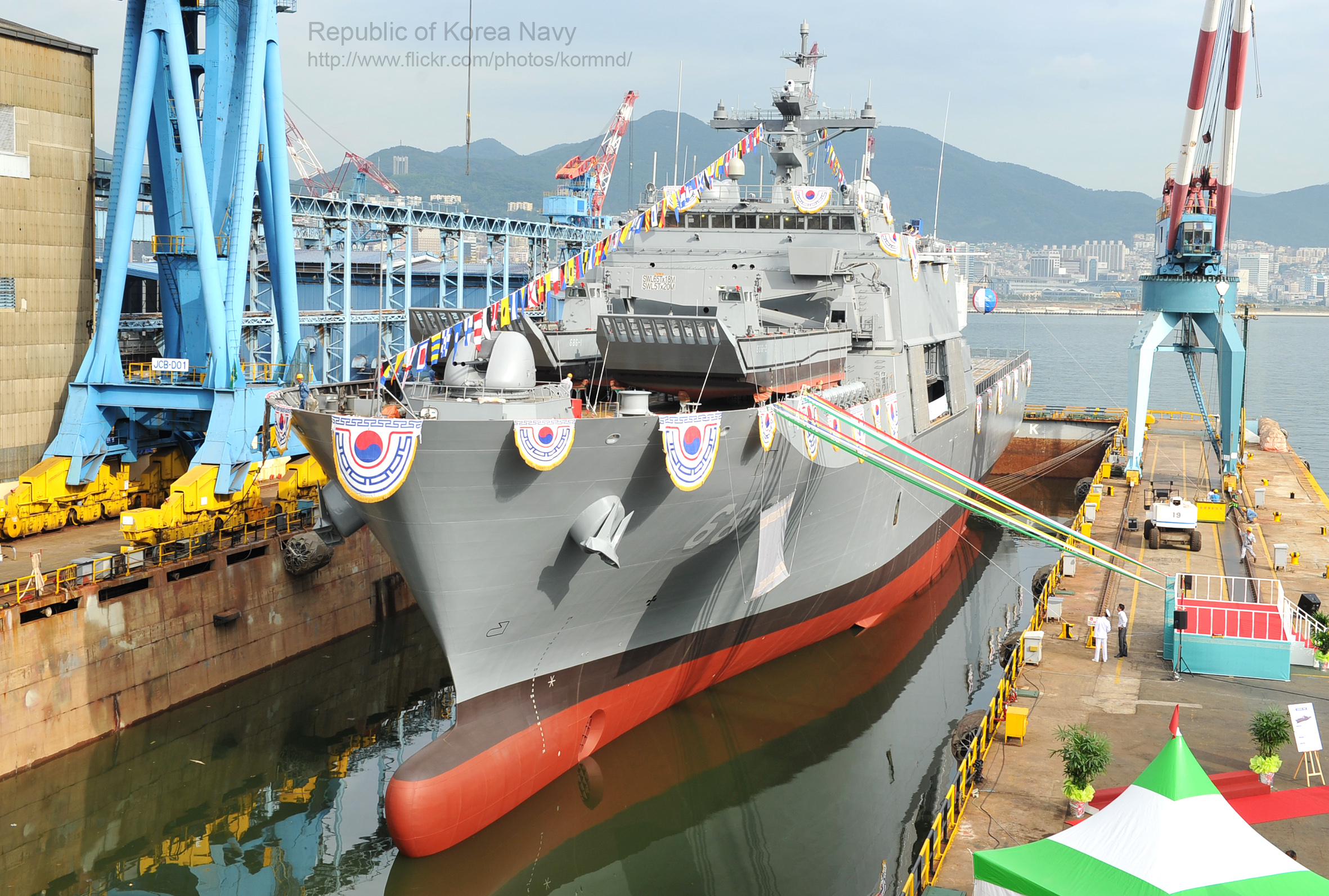 '13. 9.11 차기상륙함인 4500톤급 천왕봉함 진수식이 부산 한진중공업 조선소에서 거행되었다 촬영자 : 배준호